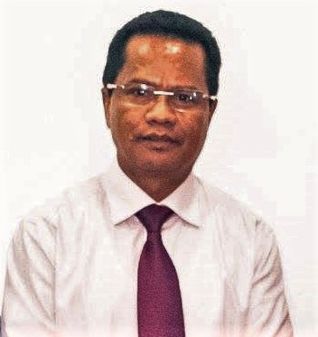 Aniceto Guterres Lopes, Parlamentspräsident in Osttimor